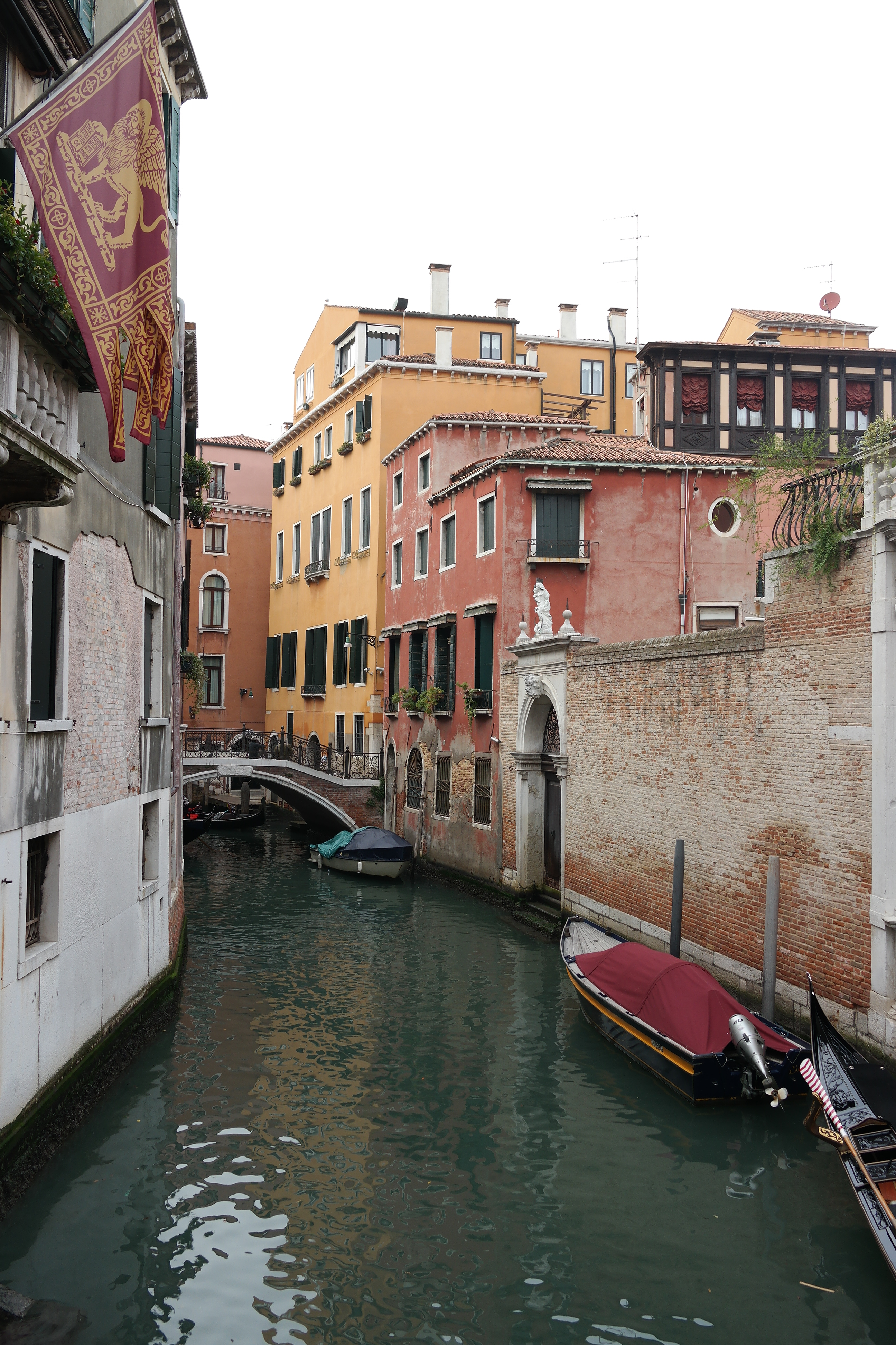 Rio San Zulian a Venezia